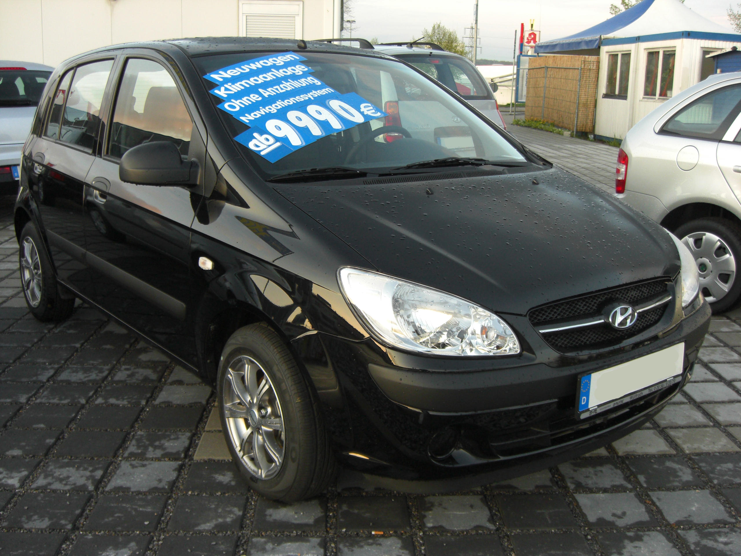 Hyundai Getz